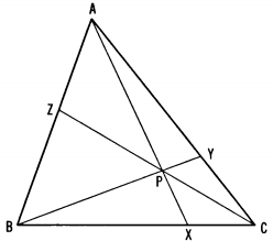 Teorema e Ceva's